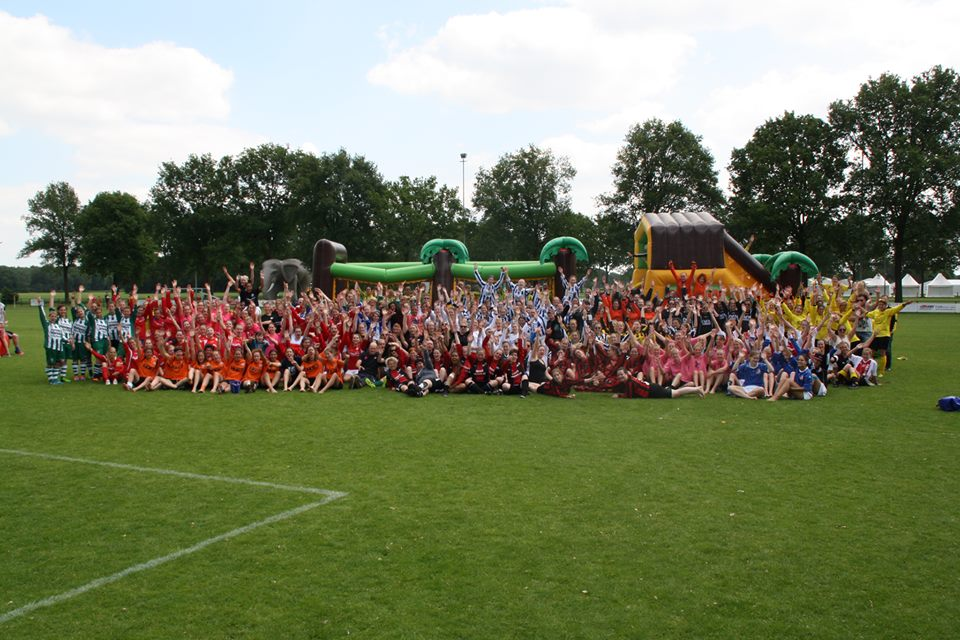 Deelnemers damestoernooi 2014